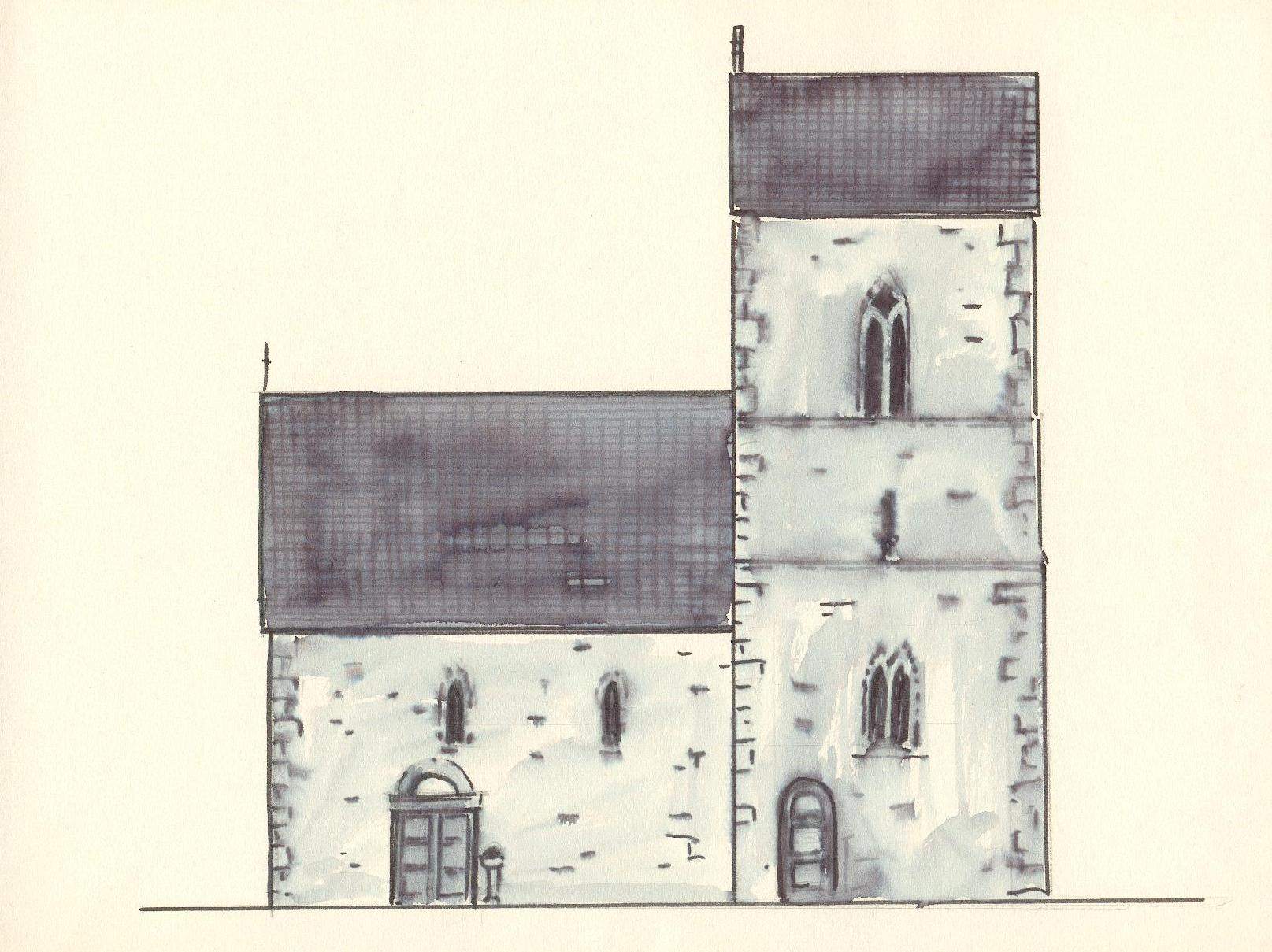 Rekonstruktion der Wittelbacher Kirche um 1250